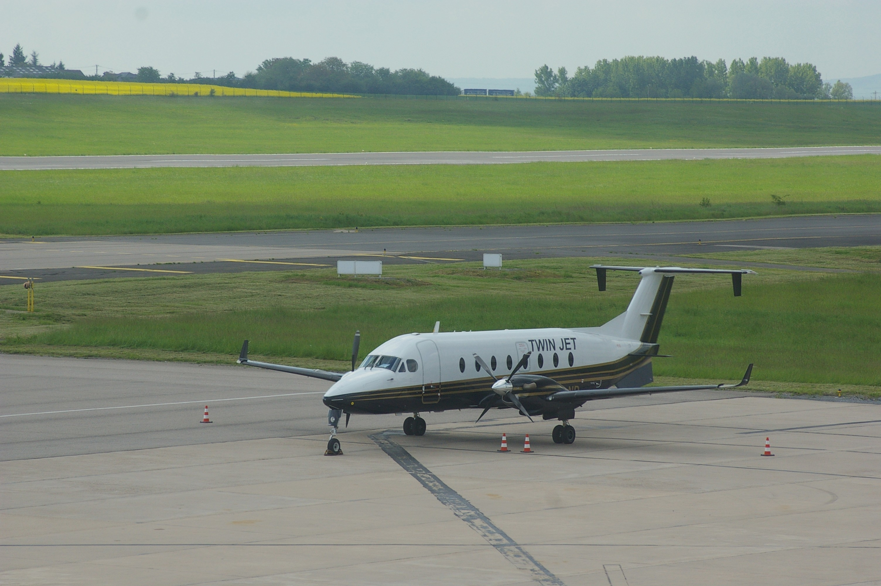 Un Beechraft 1900 de la compagnie Twin Jet sur le tarmac de l'aéroport Metz-Nancy Lorraine